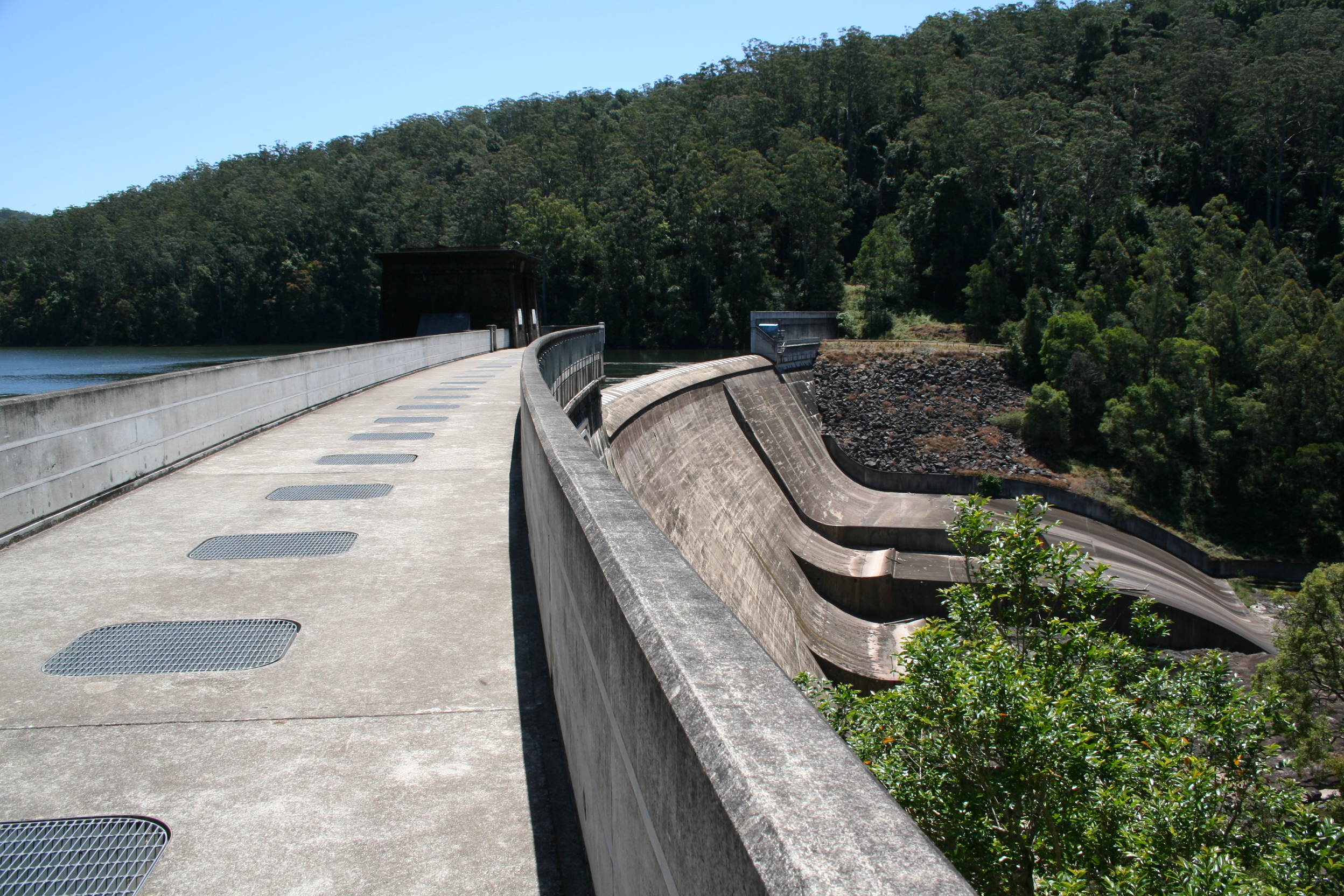 Chichester Dam